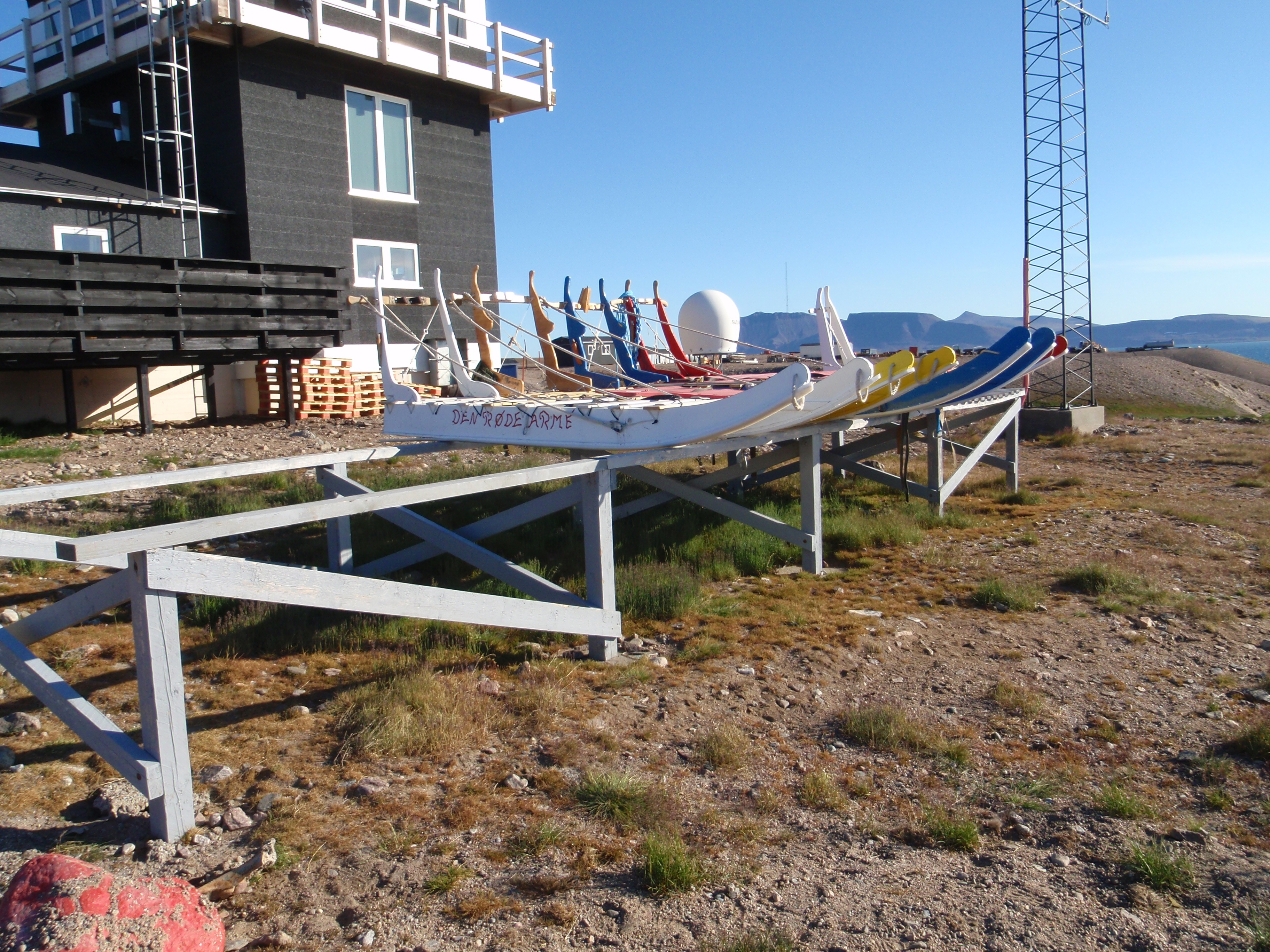 Slæder lagt op for sommeren på Daneborg